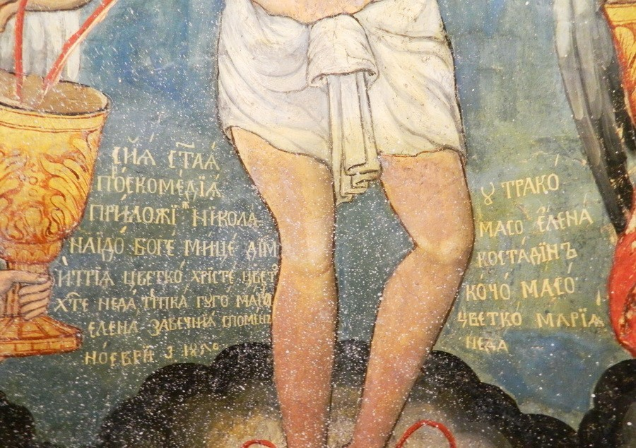 Фреска во црквата „Св. Ѓорѓи“ во прилепско Тројаци